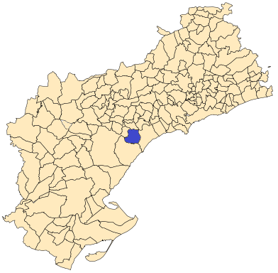 Situación de Pratdip en la provincia de Tarragona.